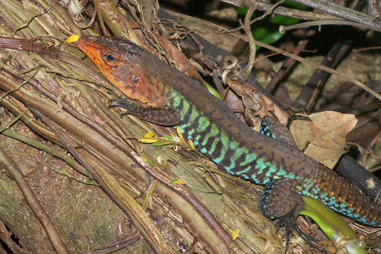 Ameiva undulata